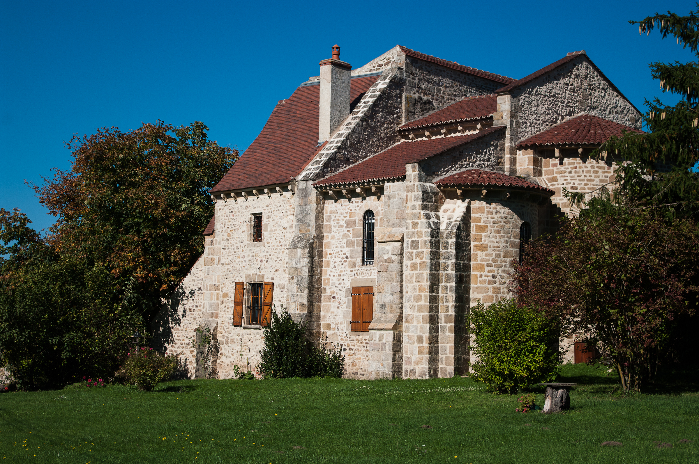 Prieuré de Saint-Maurice, (Inscrit, 1933) .